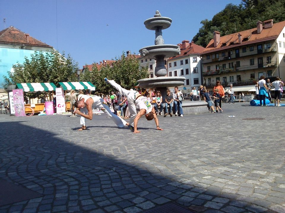 Na predstavitvah je več poudarka na teatralnosti, akrobatiki in "lepi igri" (jogo bonito). Na fotografiji ŠKD Capoeira Slovenija